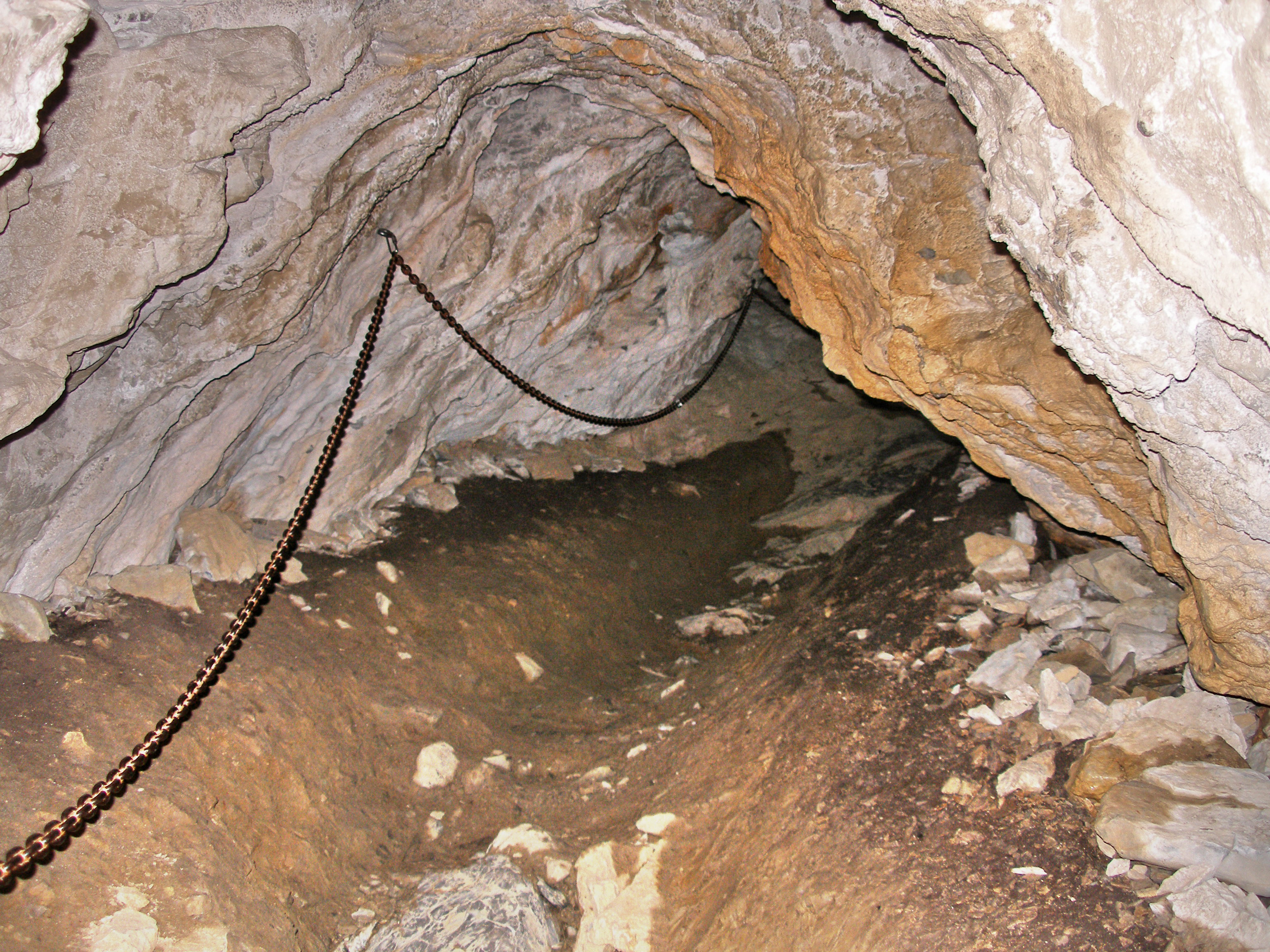 Wnętrze jaskini Smocza Jama w Wąwozie Kraków w Tatrach Zachodnich